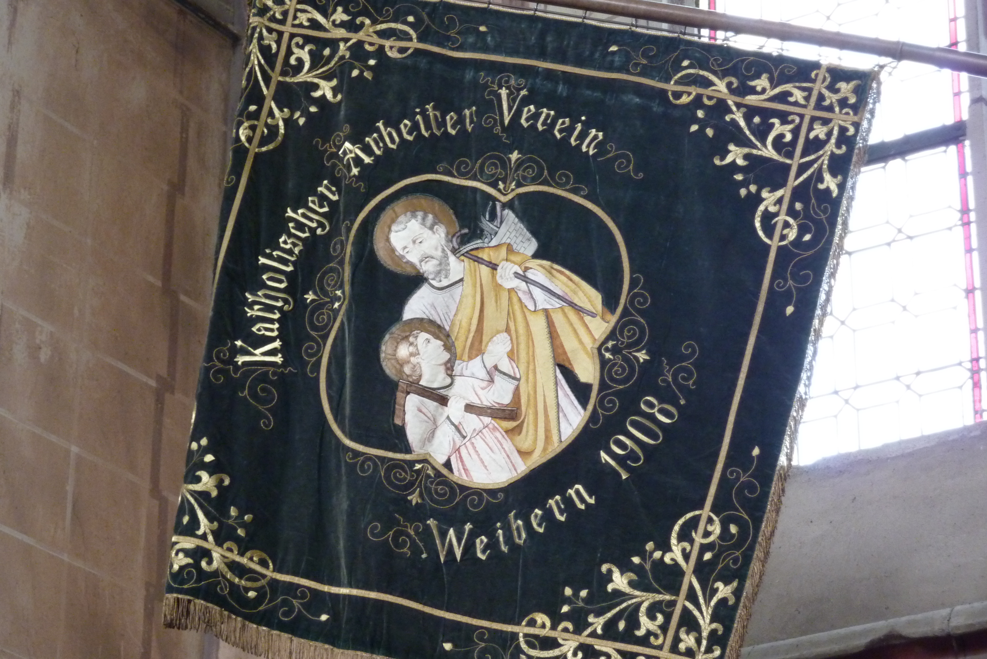 Katholische Kirche St. Barbara in Weibern: Fahne des Katholischen Arbeitervereins Weibern 1908